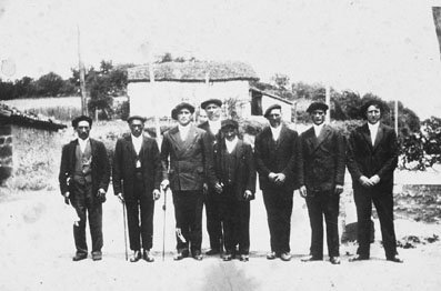 EAJ Corporación